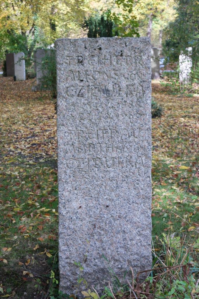 Grab des Schriftstellers Alfons von Czibulka (1888-1969) auf dem Westfriedhof in München